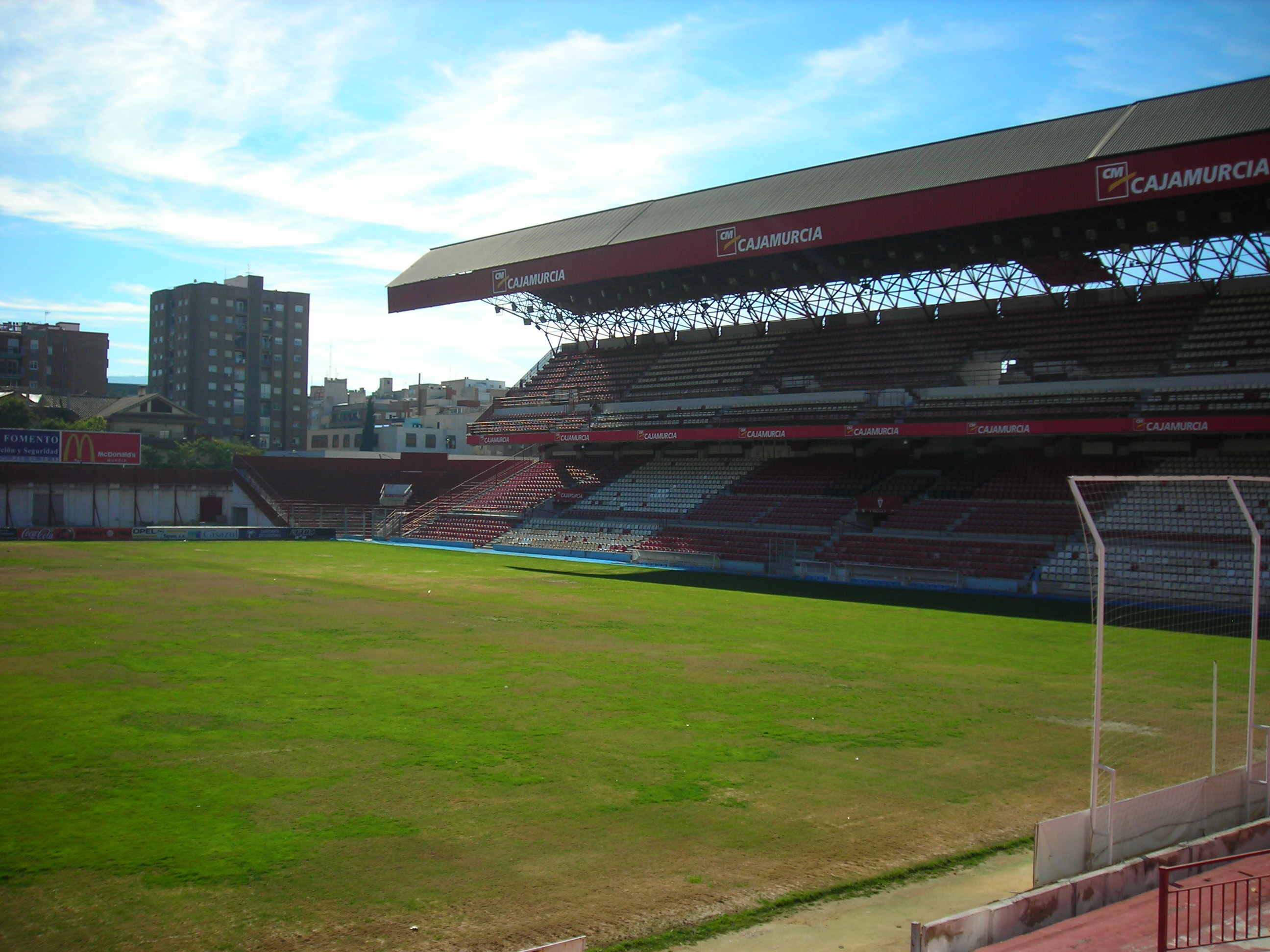 Estadio de la Condomina (Murcia, España)